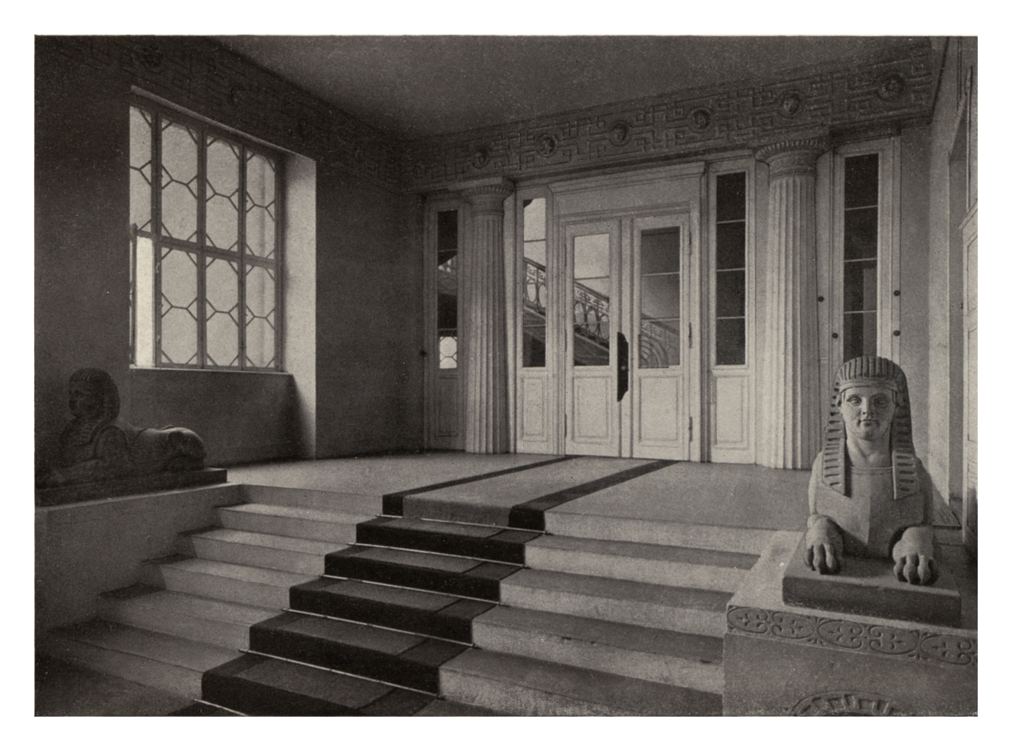 Baer, C. H. - Deutsche Wohn- und Festräume aus sechs Jahrhunderten Band 6 Verlag von Julius Hoffmann, Stuttgart 1912